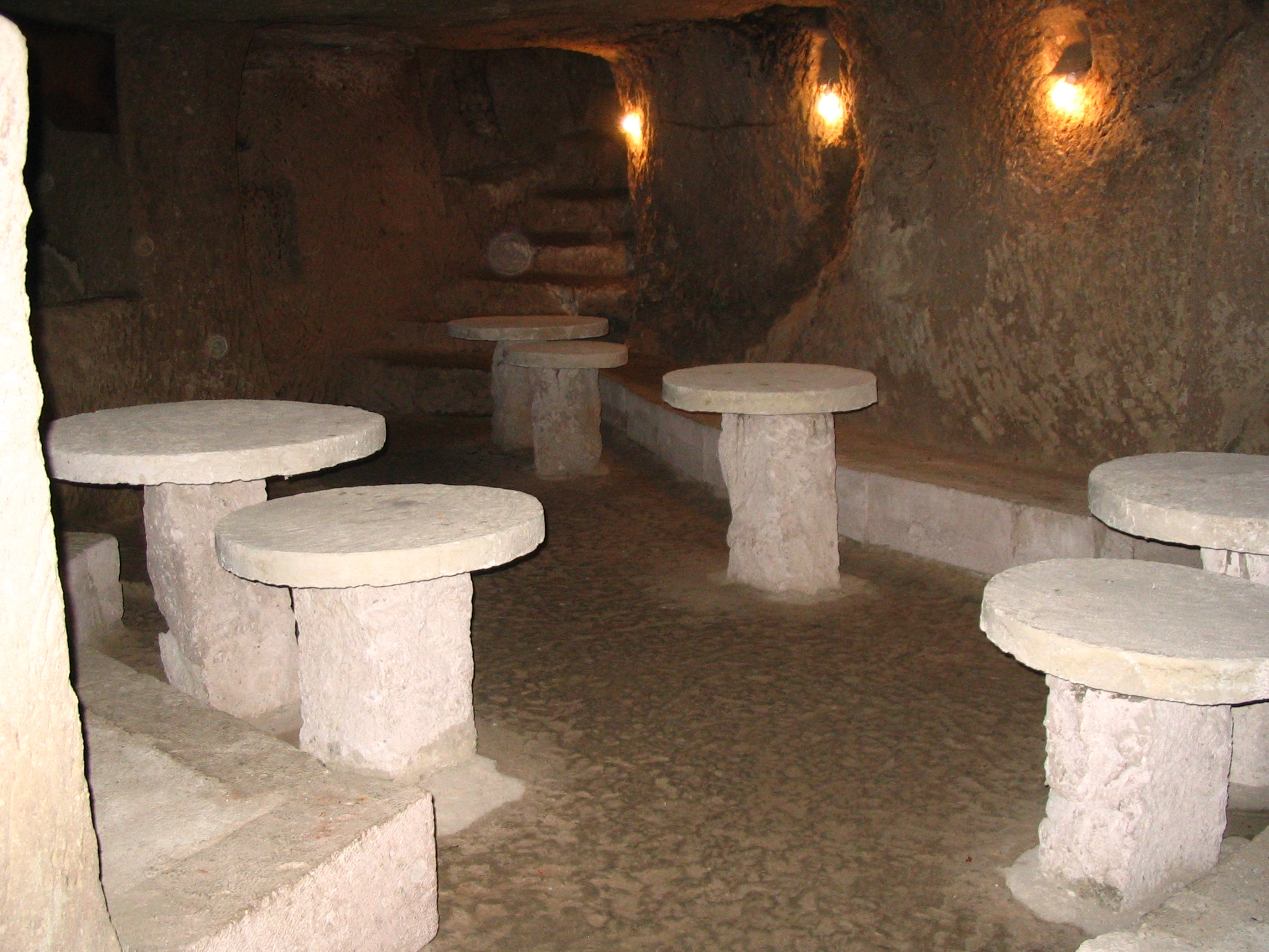 Disko in unterirdischer Stadt in Güzelyurt, Kappadokien, Zentraltürkei